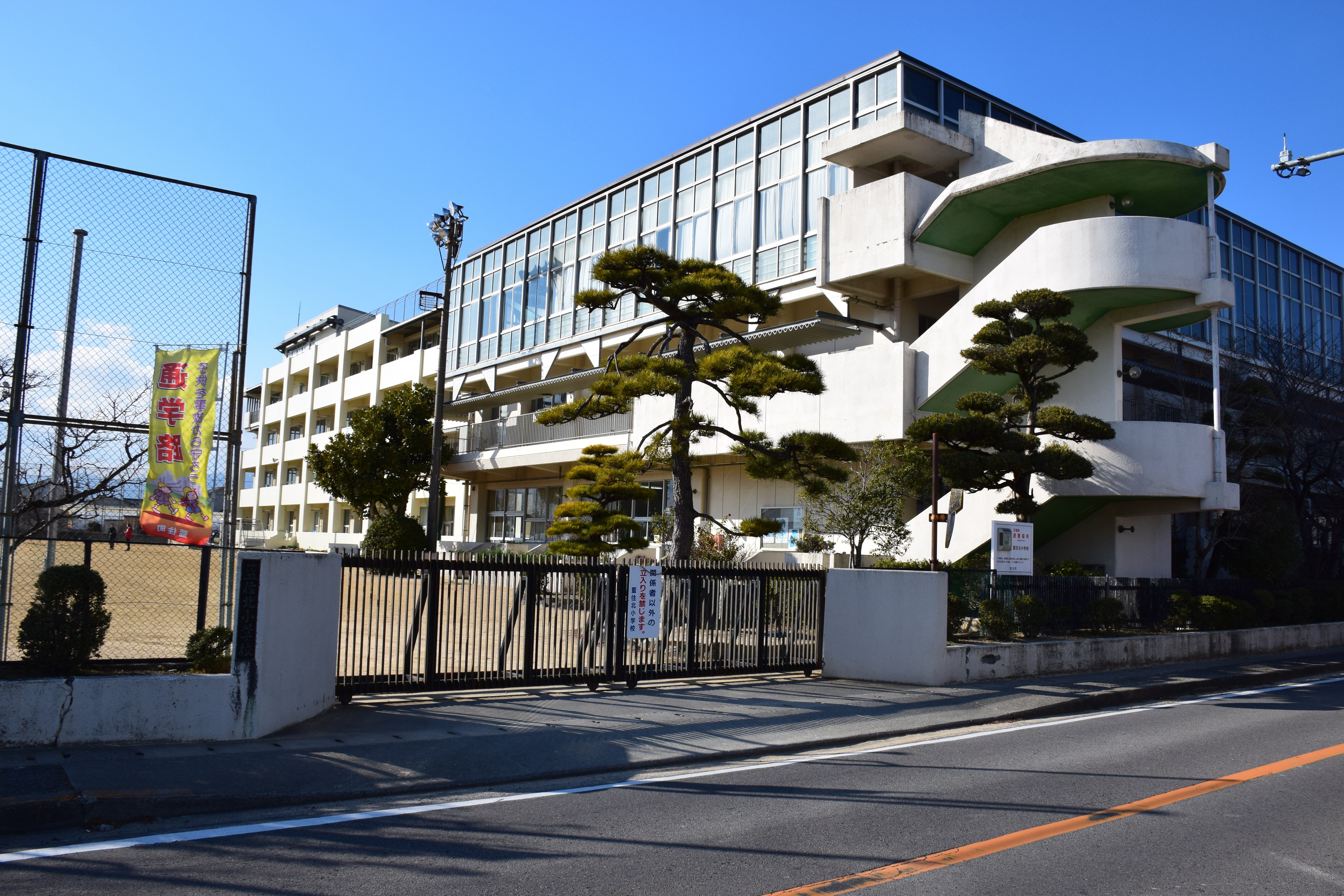 藍住町立藍住北小学校